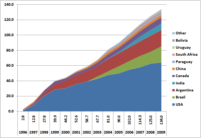 Cultivo de organismos modificados genéticamente (millions of hectares; source: ISAAA)